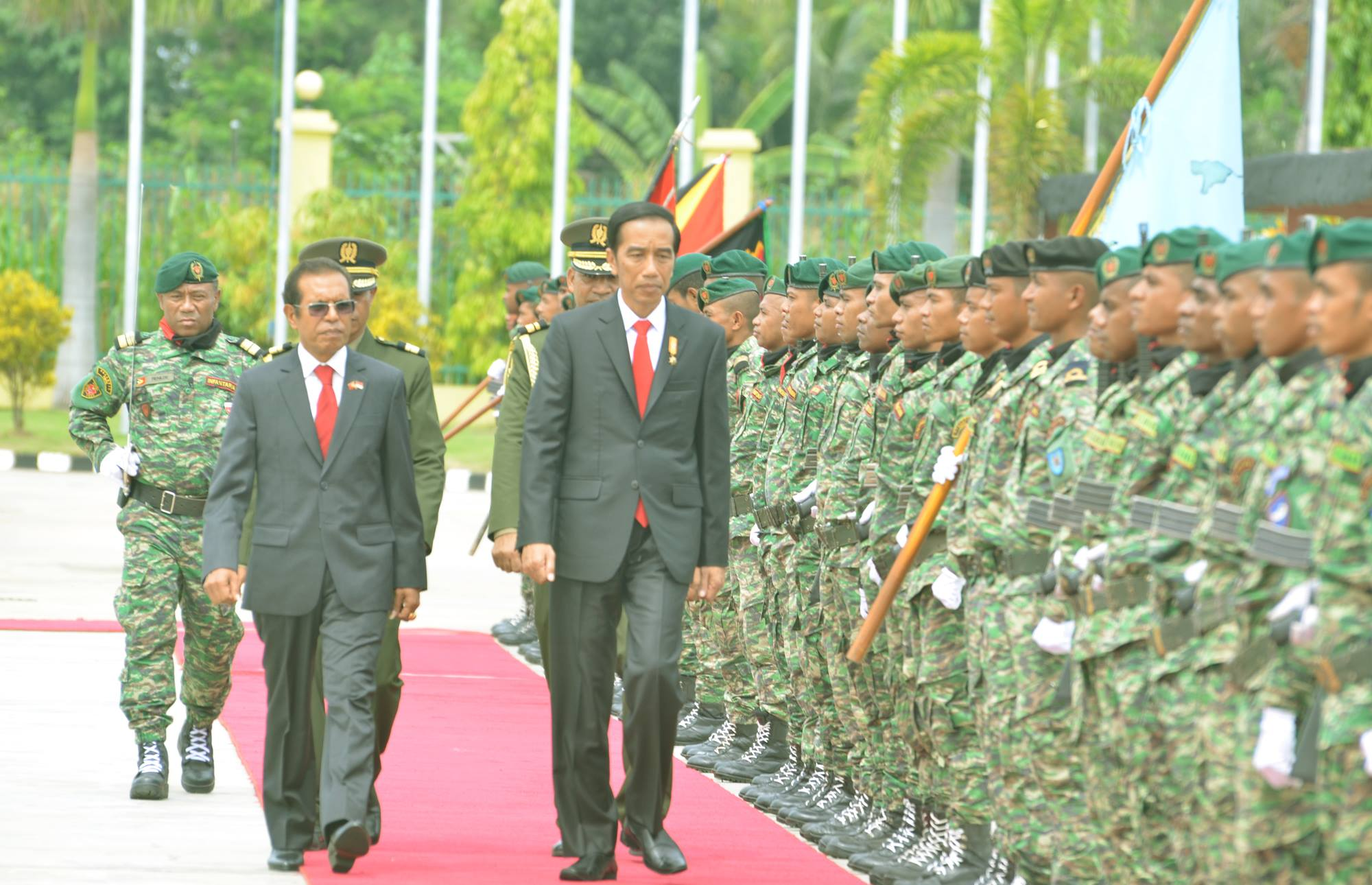 Joko Widodo zu Besuch bei Taur Matan Ruak in Dili